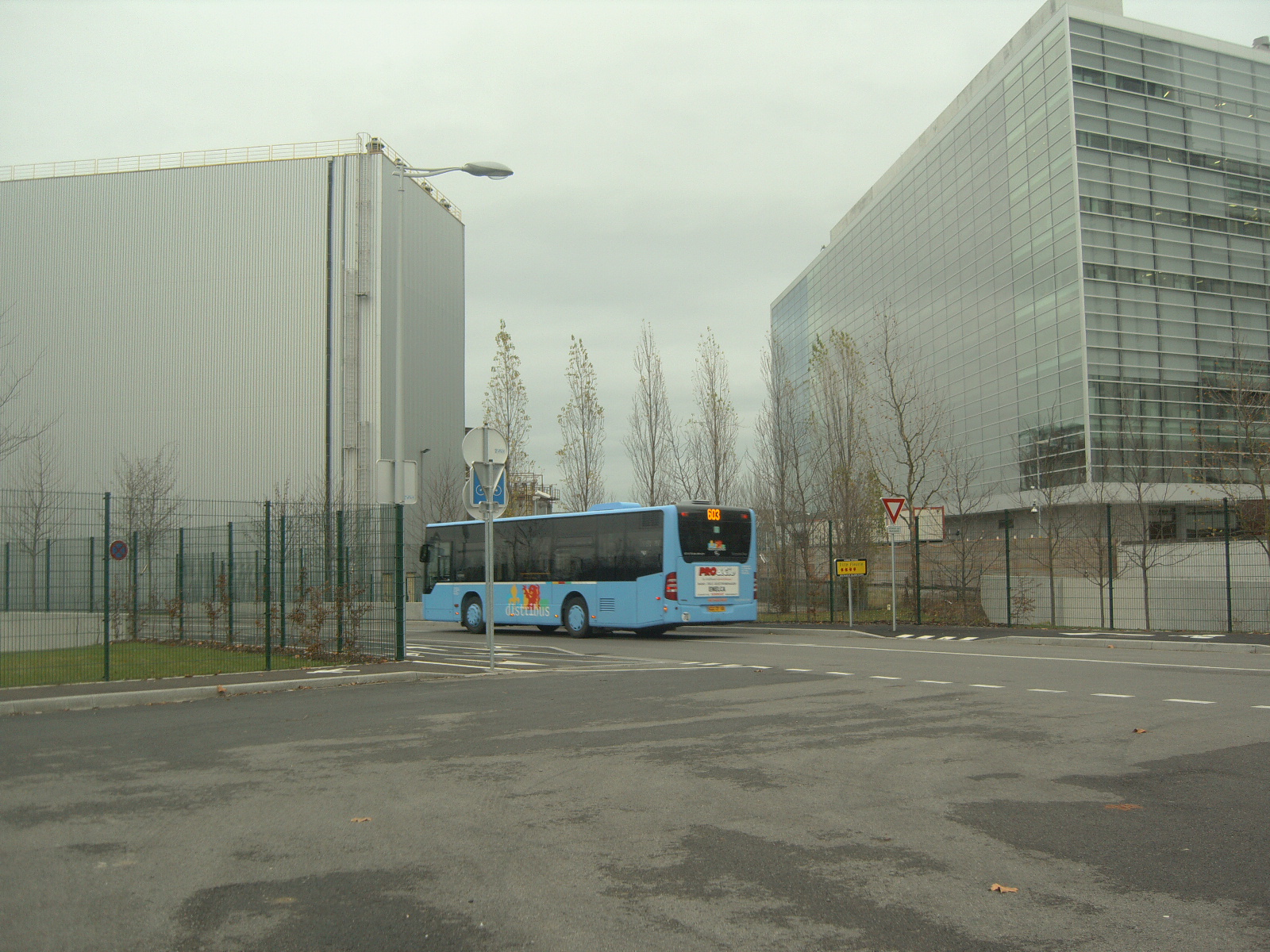 Citaro K de la ligne 603 de Distribus à la frontière de Huningue-Bâle.